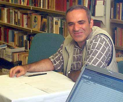 Lo scacchista Garry Kasparov a Roma, nell'agosto 2004, in una libreria di Corso Vittorio Emanuele (centro storico) per presentare un suo libro